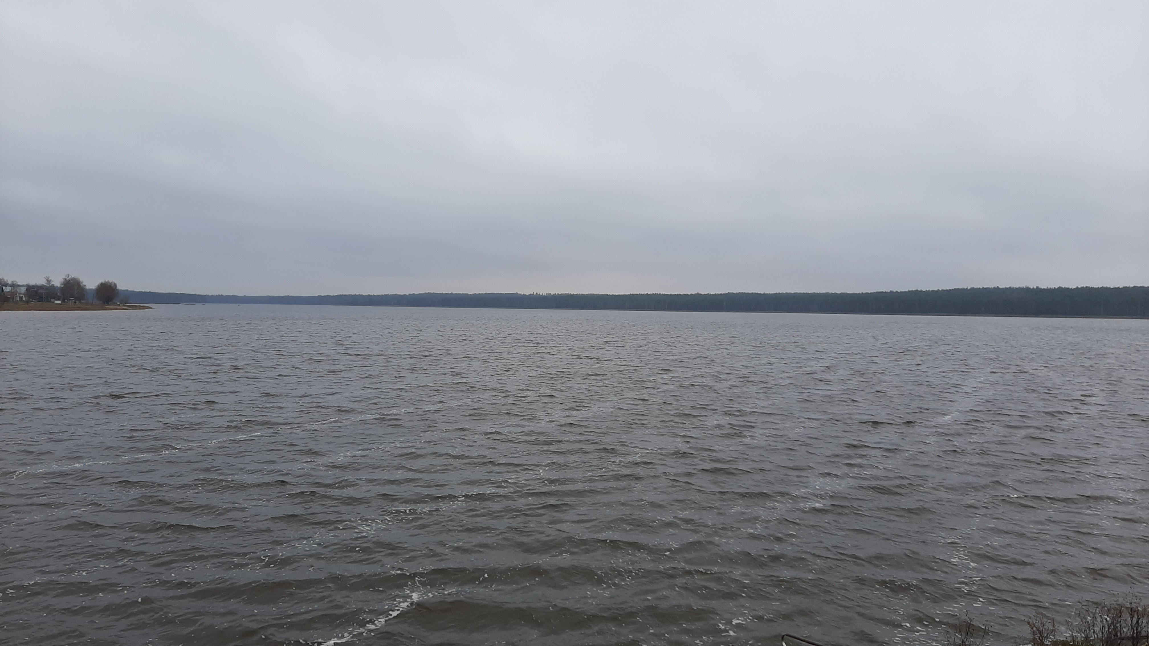 Вильский пруд